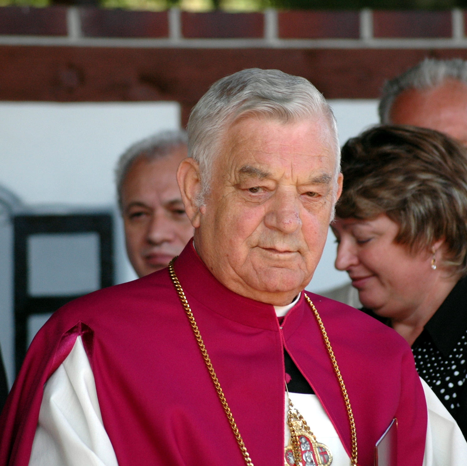 Jan Uberman - dziekan dekanatu Wolin oraz proboszcz parafii Wolin.